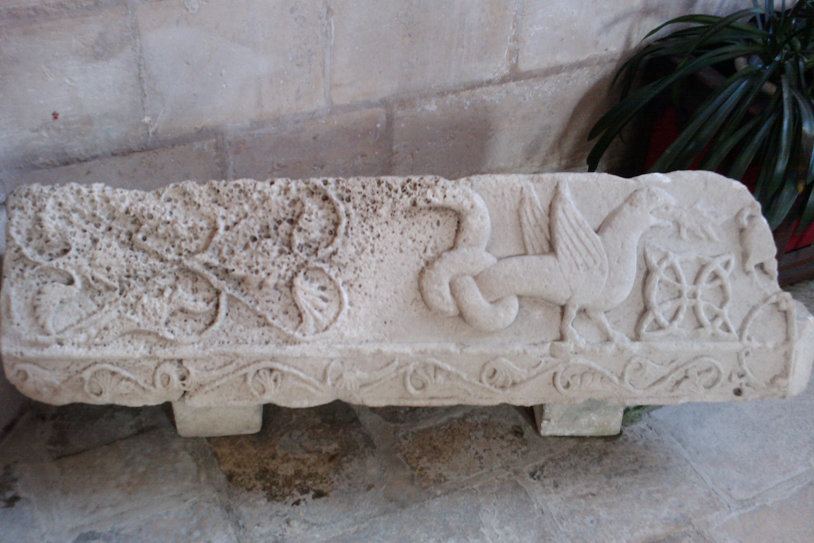 Église Sainte-Eulalie de Benet